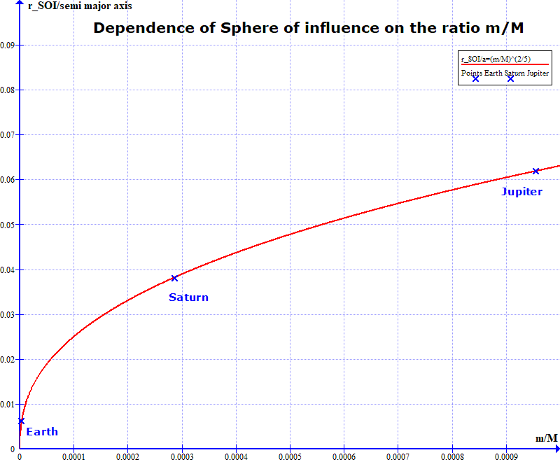 Dependence of Sphere of influence on the ratio m/M